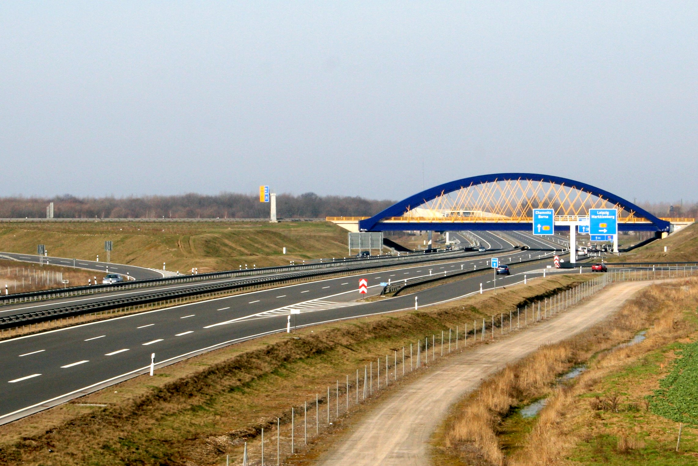 A 38, unmittelbar östlich der Anschluss-Stelle Leipzig-Süd